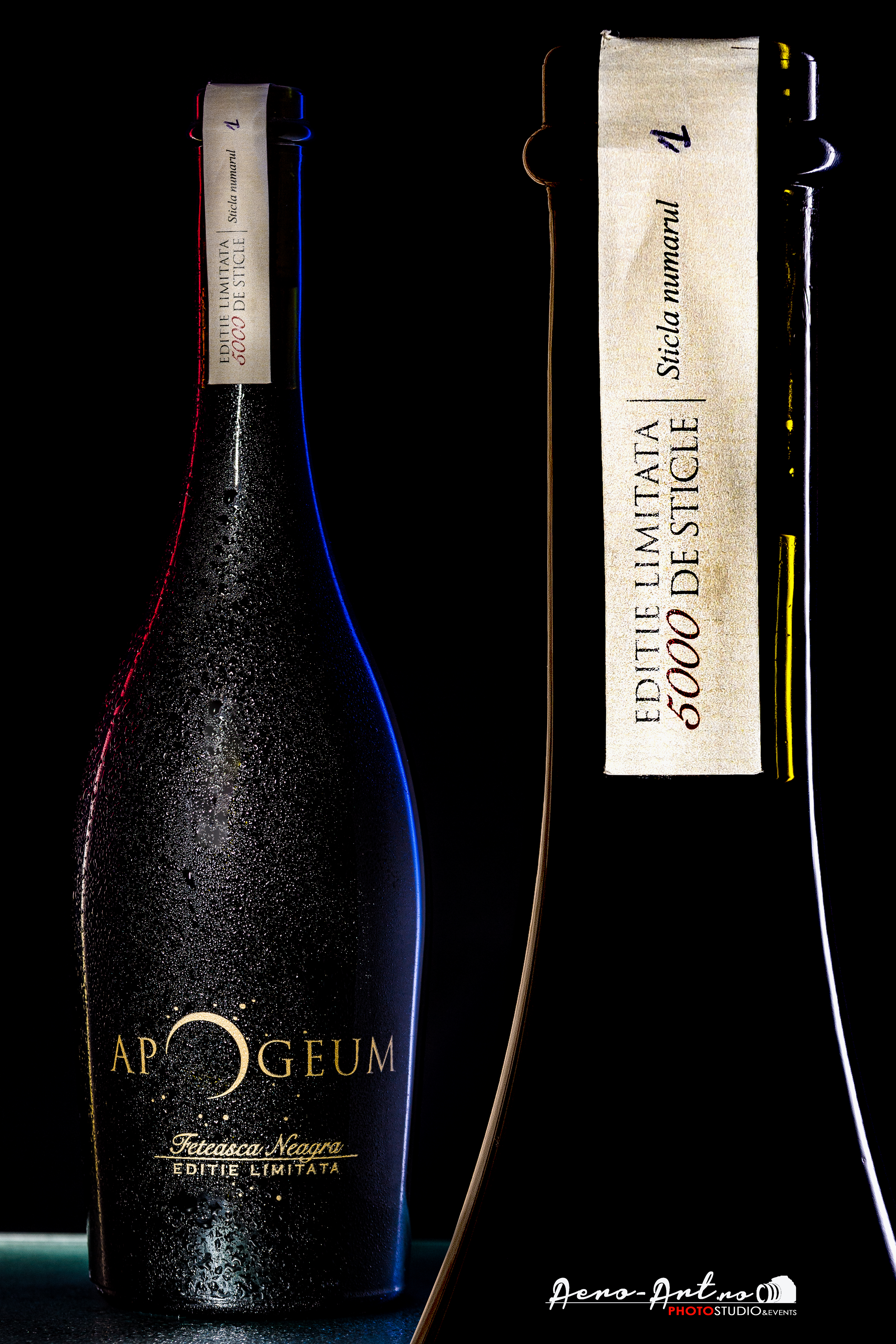 Apogeum - Feteasca Neagra